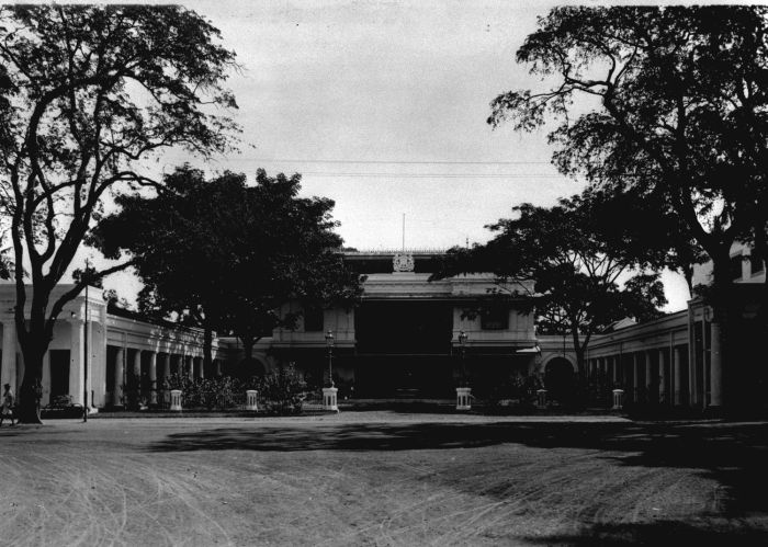 Foto. Het Gouverneurshuis te Makassar op Celebes.